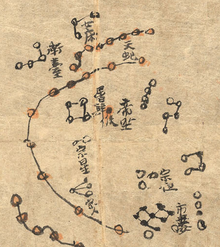 粵語: 天市垣，左垣，來自敦煌莫高窟古卷星圖